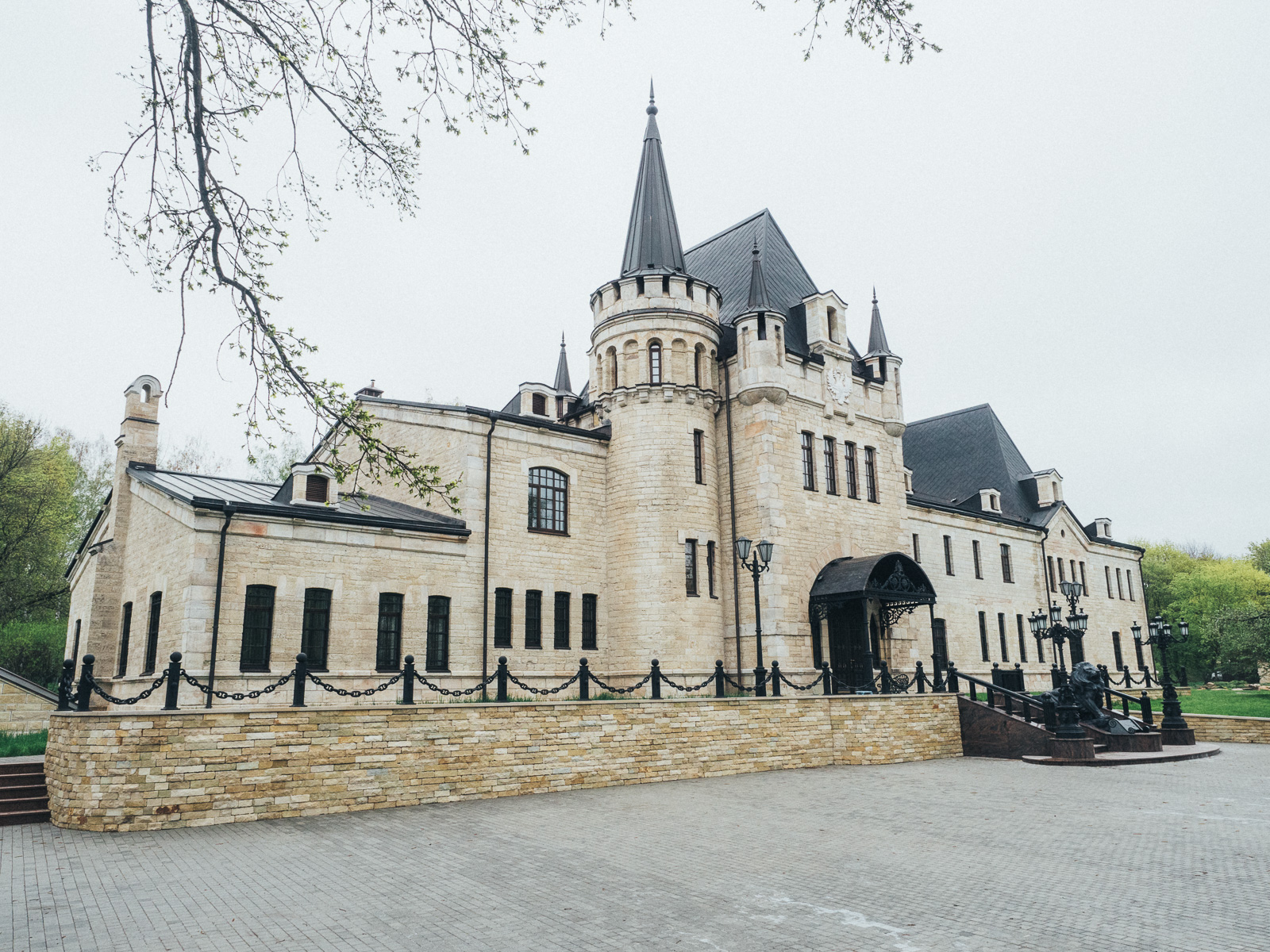 Усадьба великого князя Андрея Владимировича Романова в селе Борки после реставрации. 2016 год